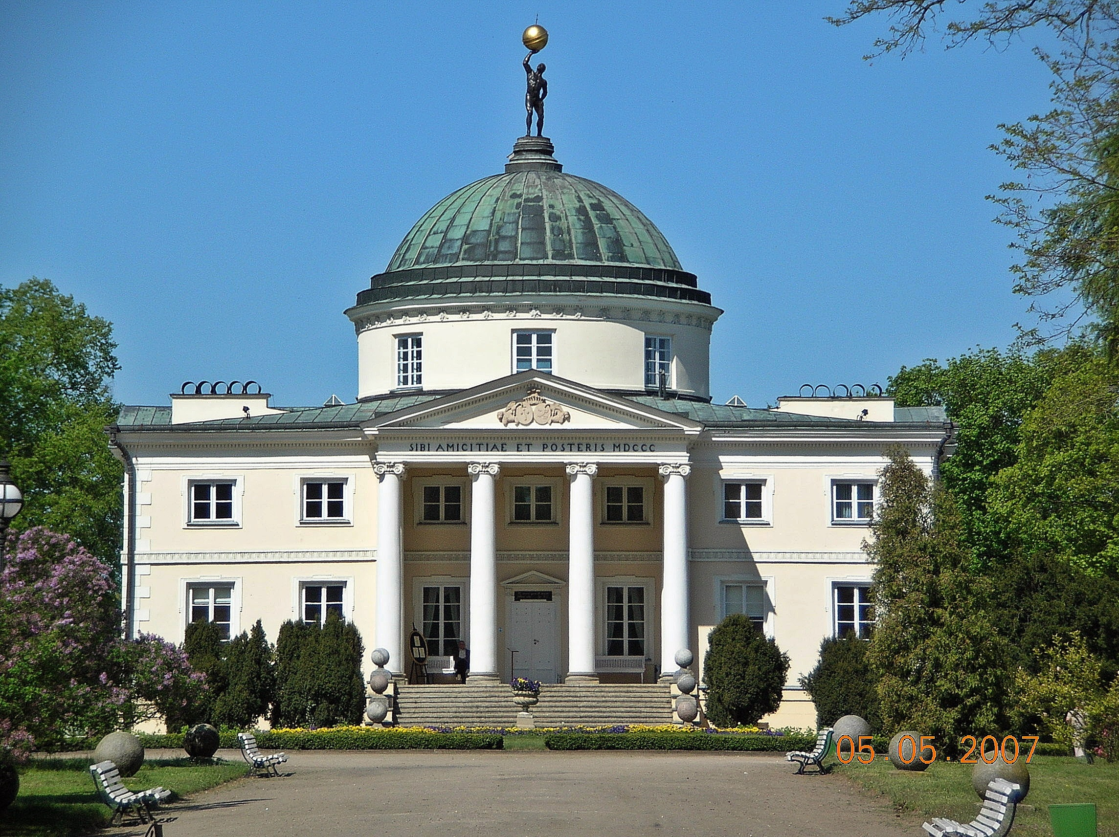 Lubostroń pałac zdjęcie frontu budynku.